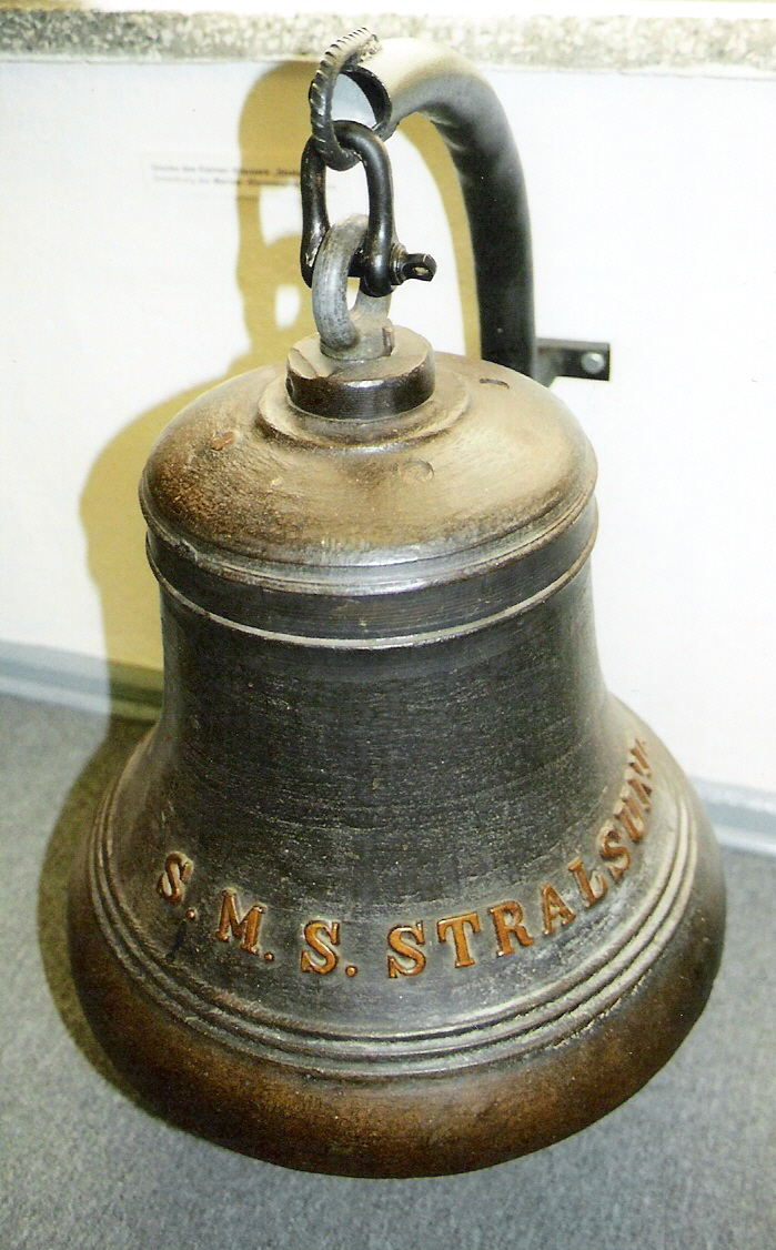 Schiffsglocke des Kleinen Kreuzers S.M.S. Stralsund, Leihgabe des Marinemuseums in Laboe für das Marinemuseum auf dem Stralsunder Dänholm, fotografiert im März 2006 vom Klugschnacker